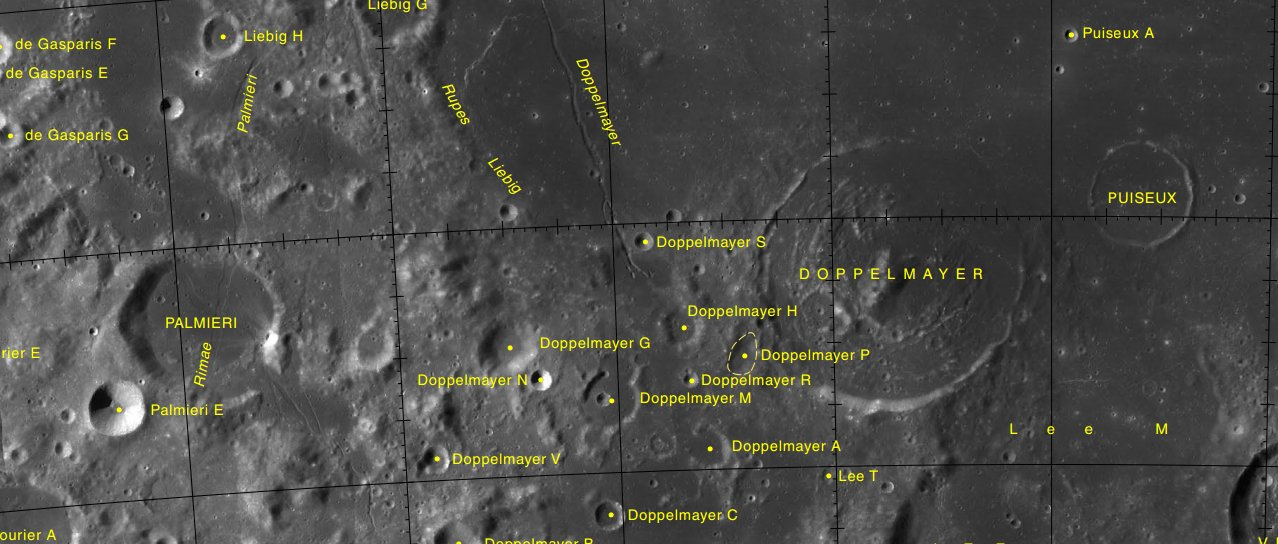 Cráter lunar Palmieri. Localización. (Imagen LRO)